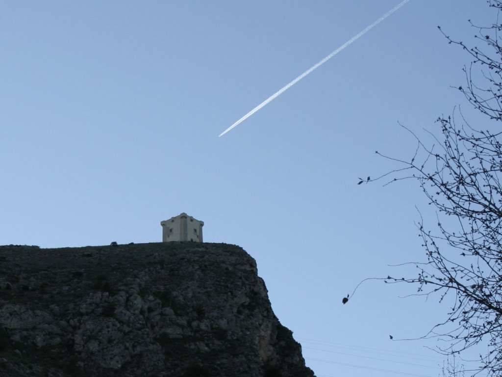 Vista del castell des del Pla de la Font